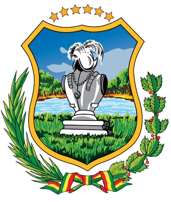 Escudo de Tarija